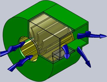 Radialventilator, Einzelbild